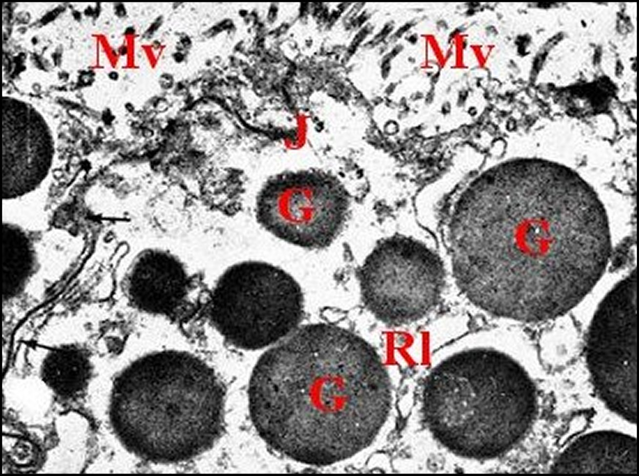 Autres pôles apicaux d'adénocytes prégonoporaux de Pholcus phalangioides montrant leurs microvillosités au microscope électronique